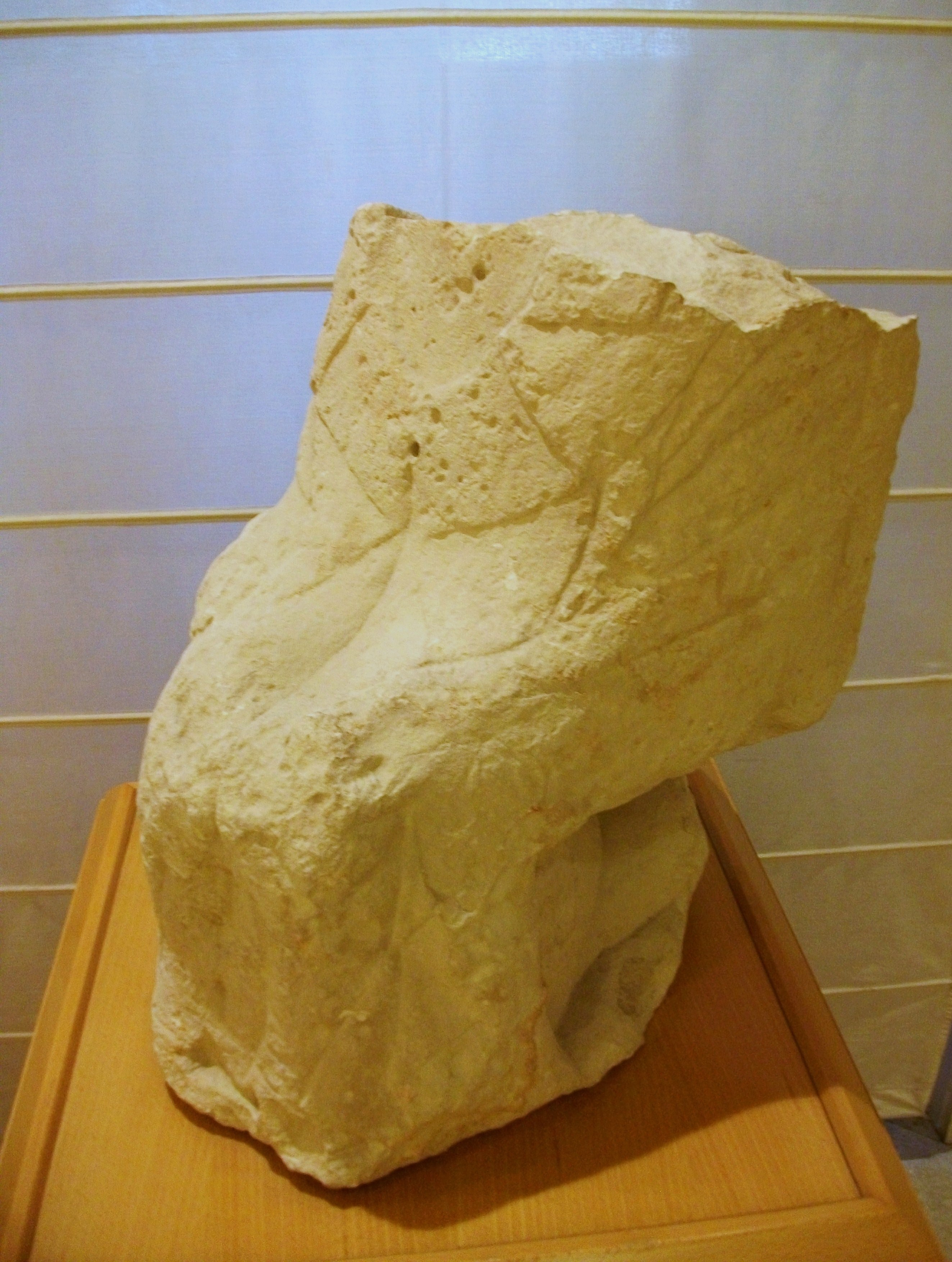 Dama de Benimassot, figura femenina sedent. Museu Arqueològic Municipal d'Alcoi.